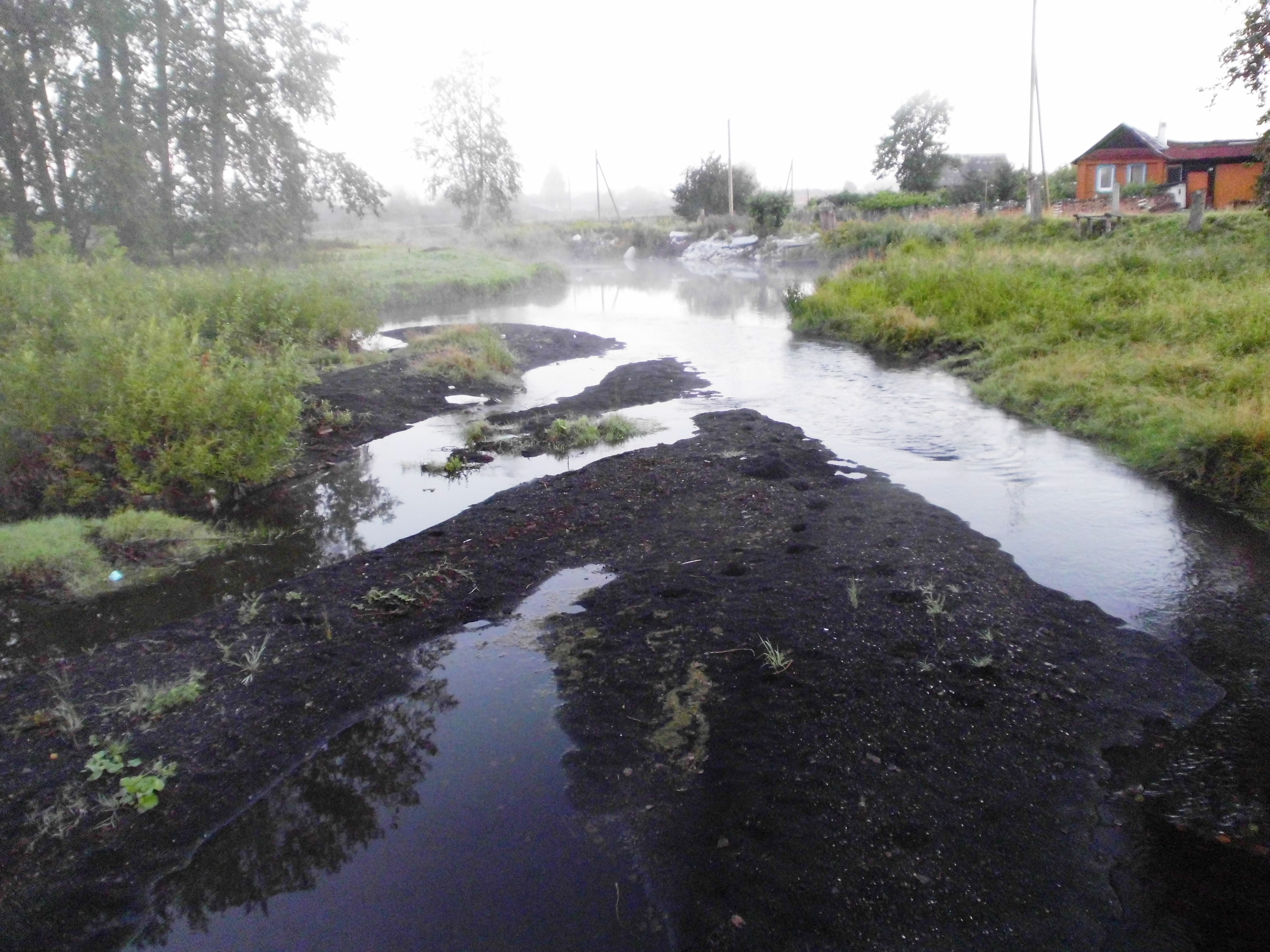 Устье реки Генералки, левый приток реки Уфалейка (Уфалей), река Уфалейка (течение справа налево на фото). Вид вниз по течению реки Генералки с пешеходного мостика у дома № 85 на ул. Чкалова, справа оранжевый дом № 86 на ул. Чкалова. Наносы шлака. Туман на рассвете. Город Верхний Уфалей.